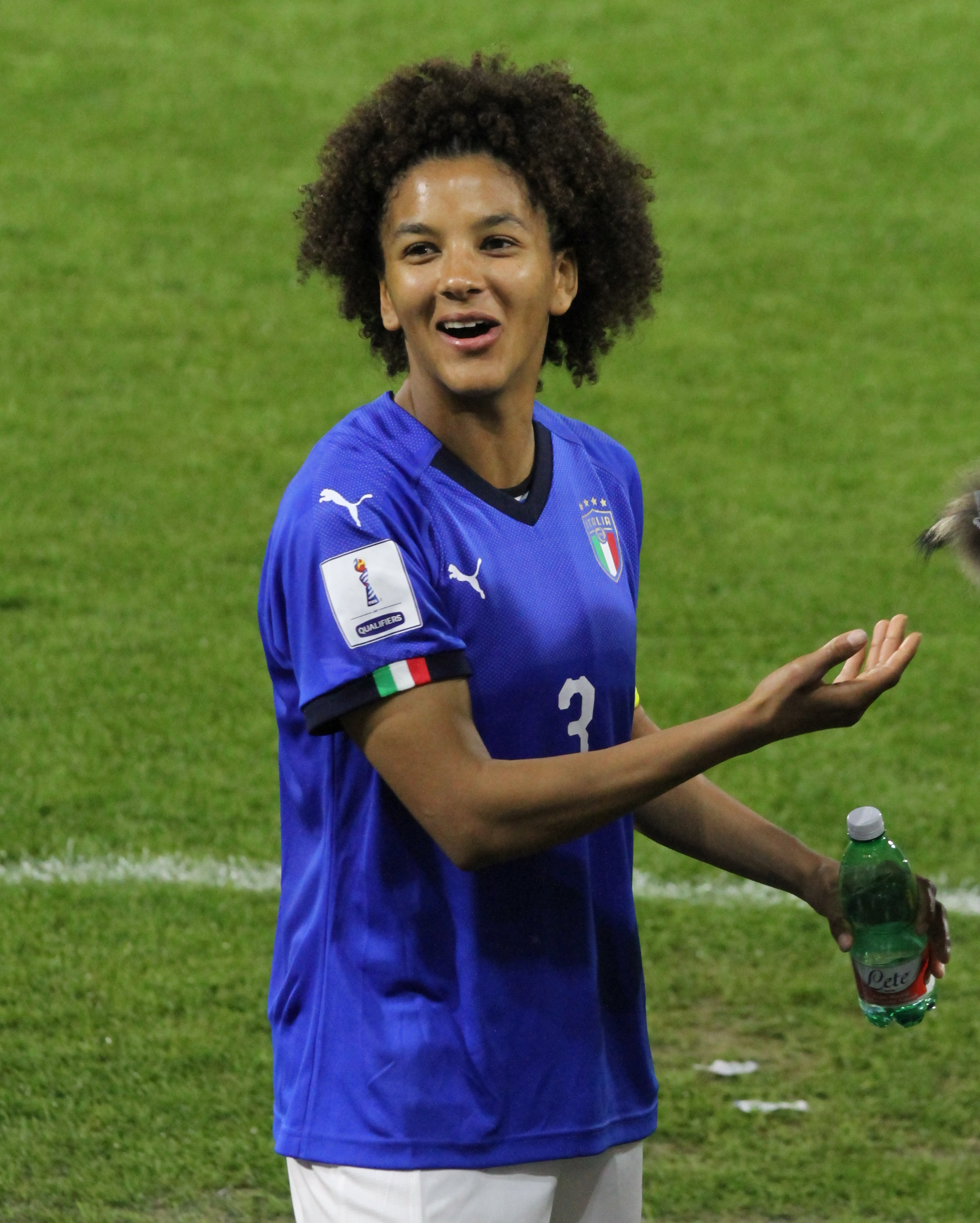 Sara Gama, Capitano della nazionale di calcio femminile dell'Italia, a fine incontro Italia-Belgio del 10 aprile 2018 allo stadio Mazza di Ferrara.